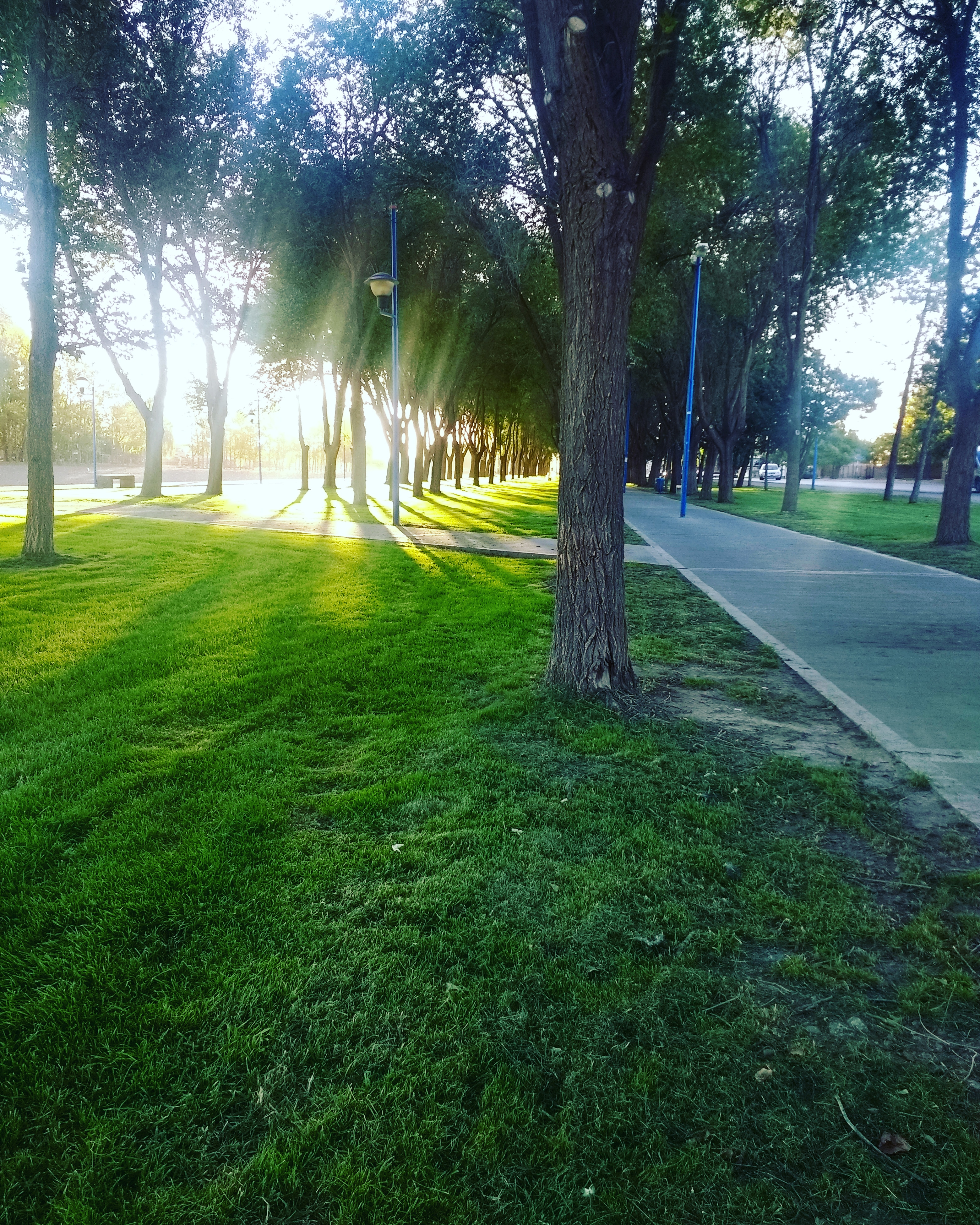 Tarde en el Canal Grande de General Roca, Río Negro, Argentina